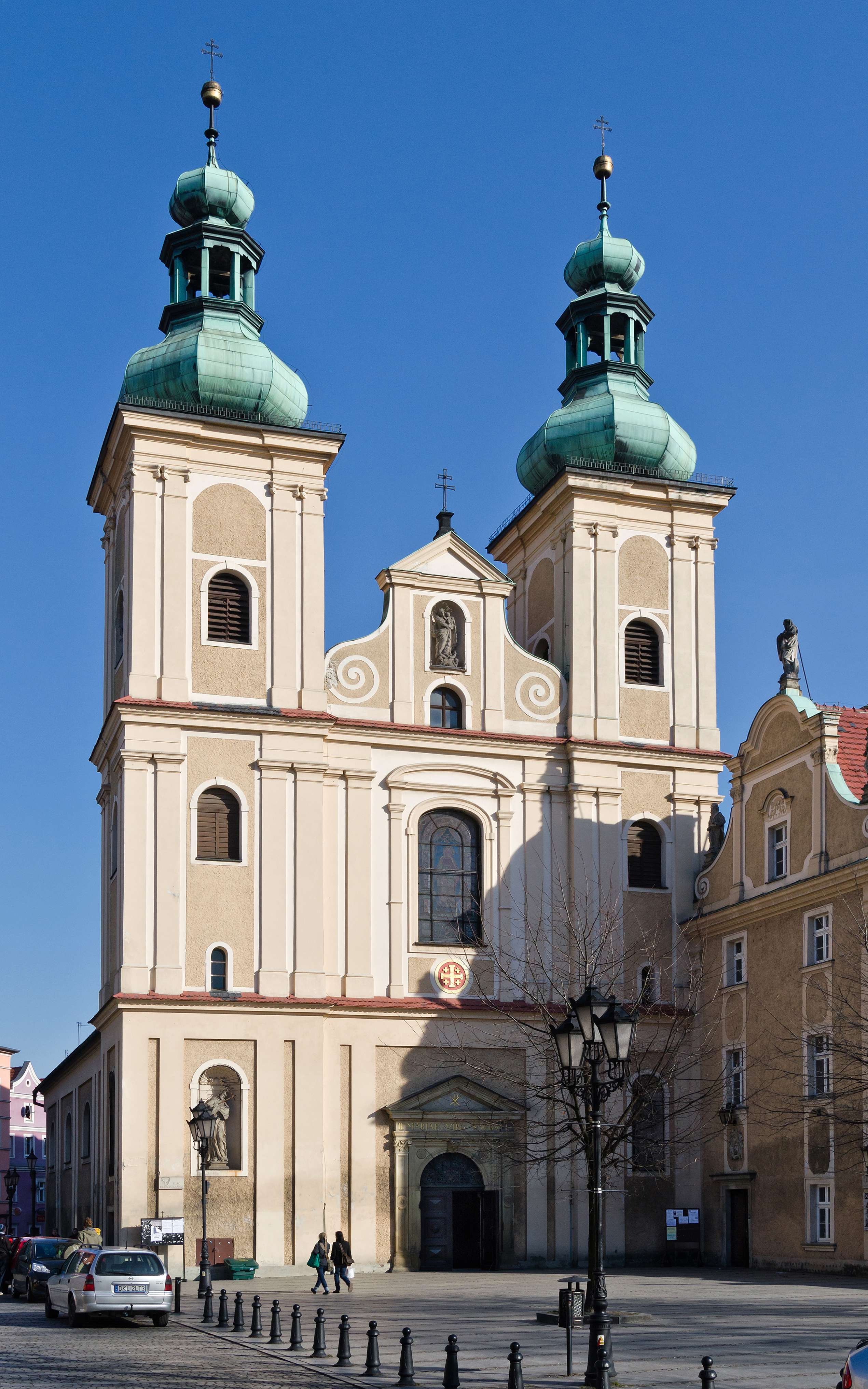 Kłodzko, kościół klasztorny Minorytów, nast. Franciszkanów, ob. parafialny p.w. MB Różańcowej, XVII, XIX